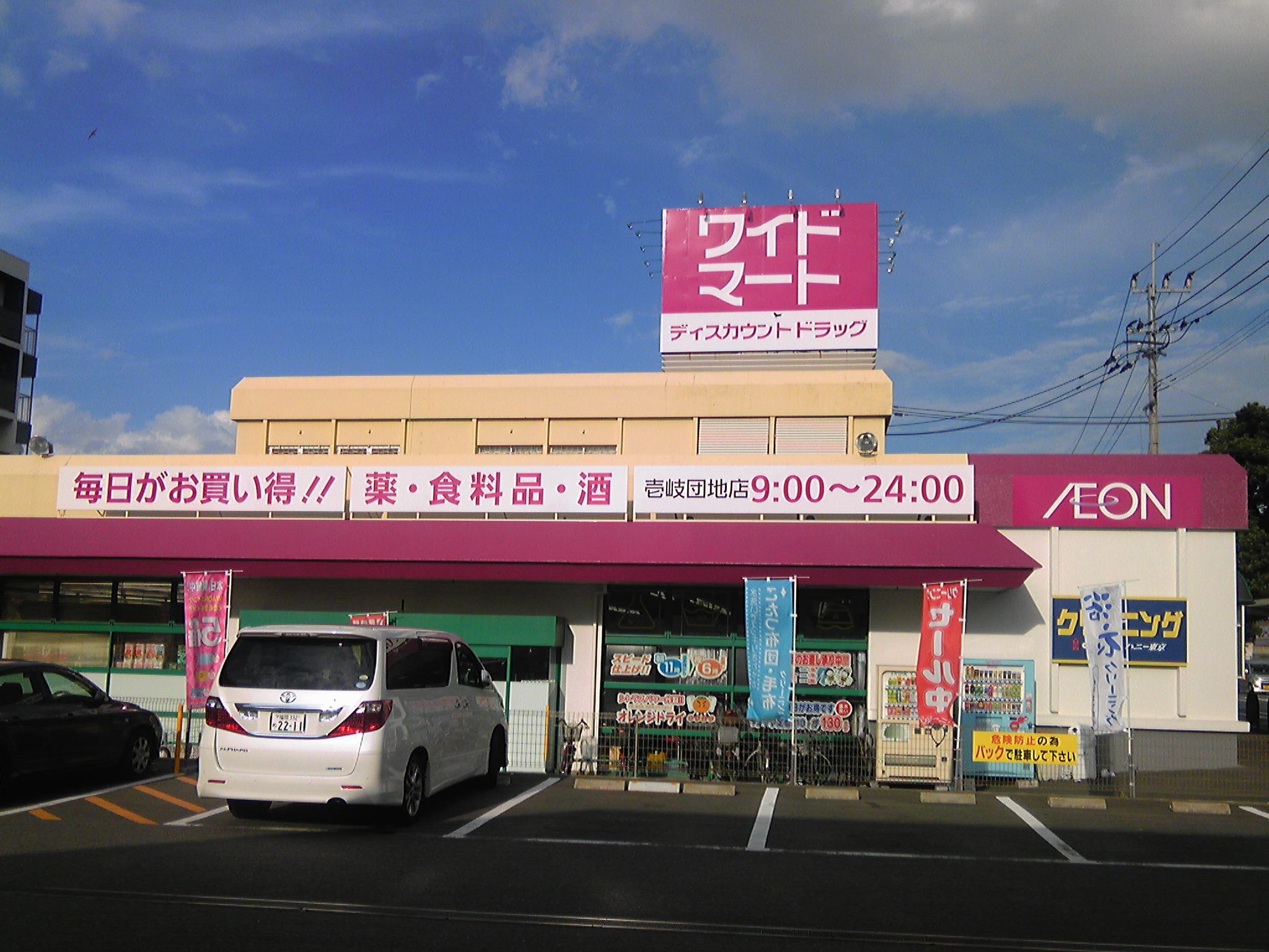 ワイドマート壱岐団地店（福岡県福岡市・イオン九州運営）